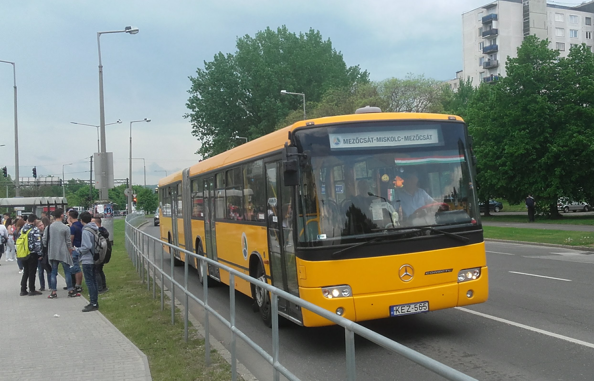 Az ÉMKK KEZ-565 rendszámú Mercedes Conecto busza Miskolcon, a 3743-as helyközi járaton.